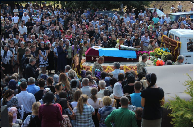 Траурну процесію